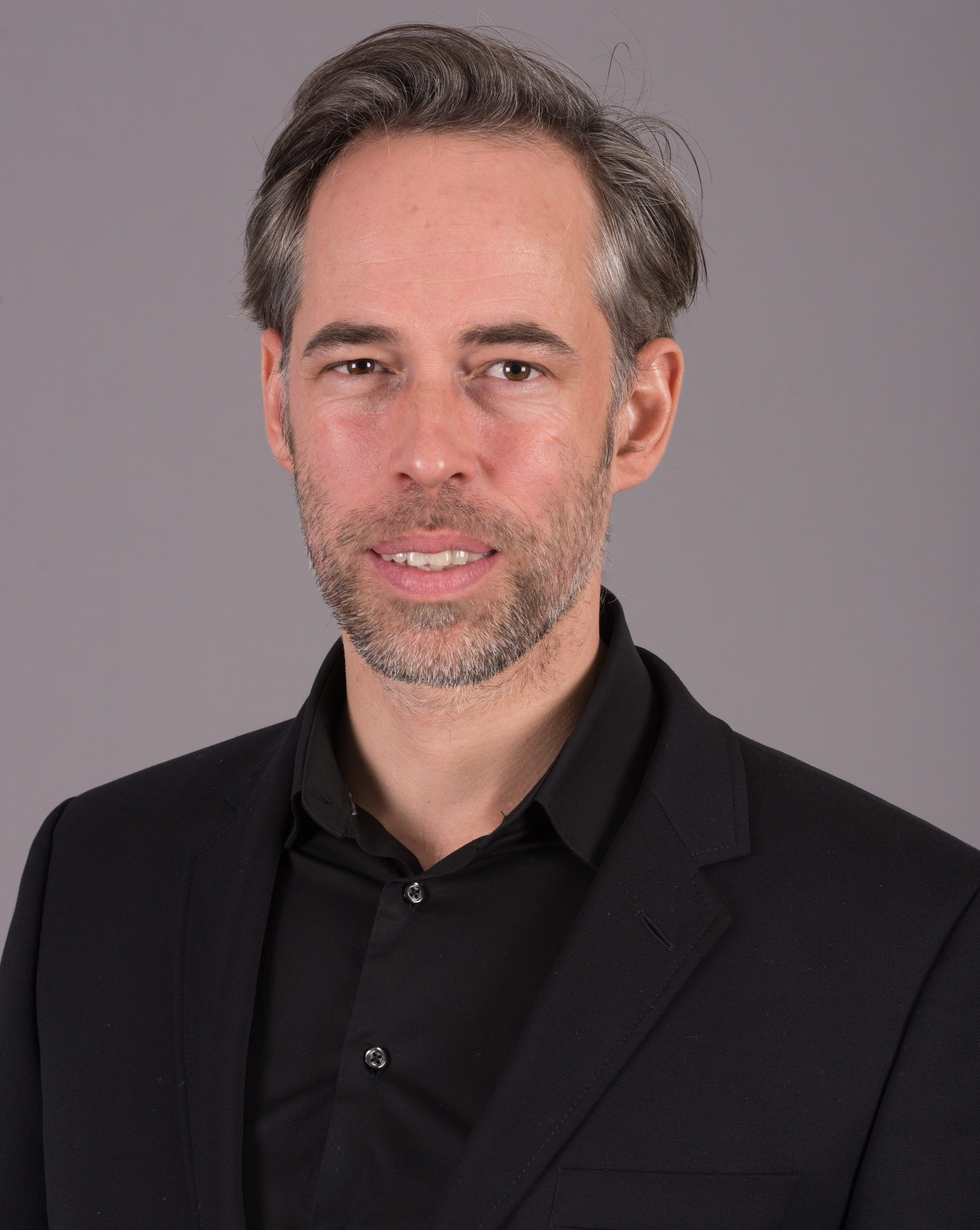 Landtagsprojekt im Thüringer Landtag